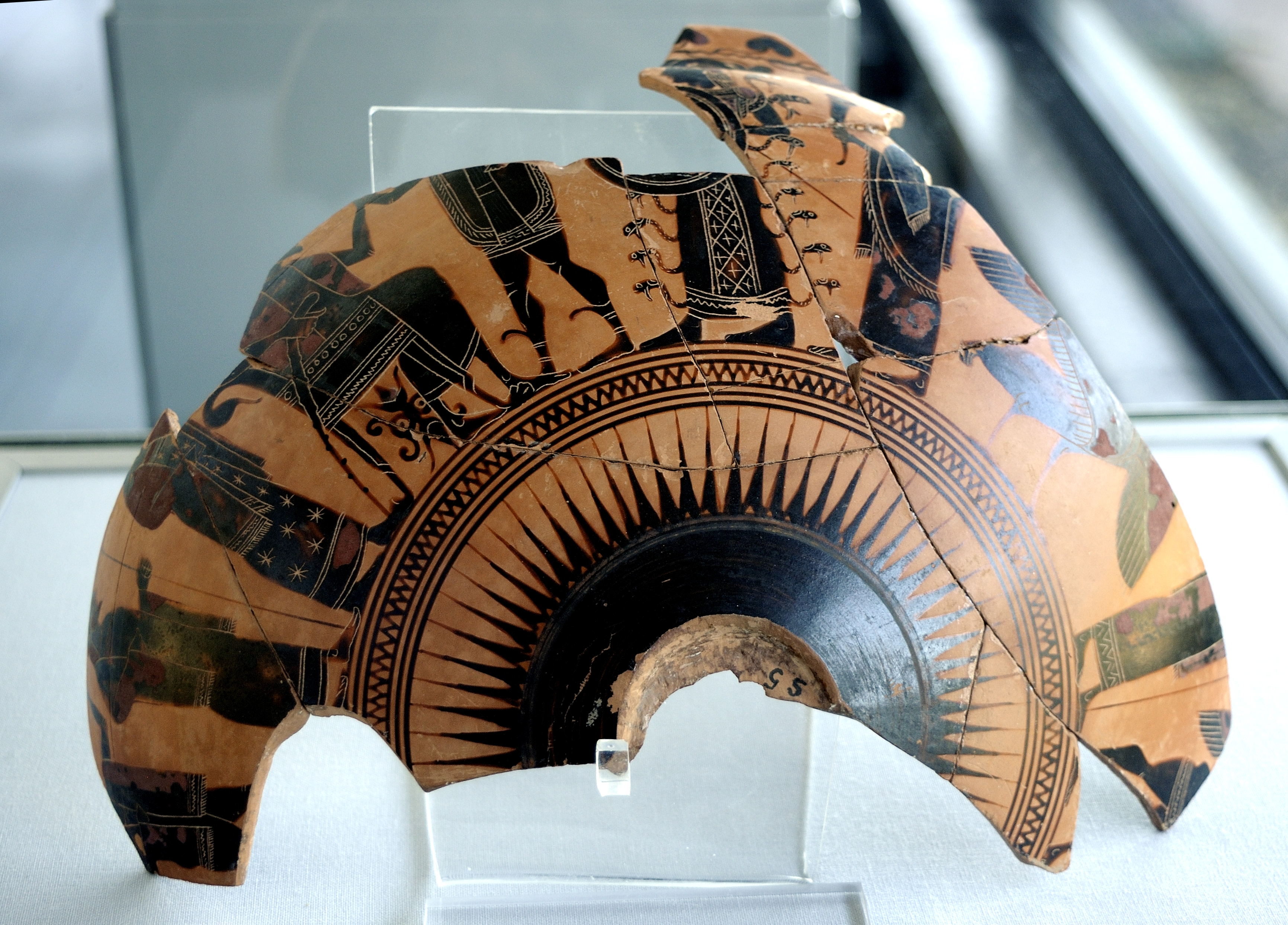 Fragment einer attisch-schwarzfigurigen Trinkschale aus Phaleron im Antikenmuseum der Universität Heidelberg.